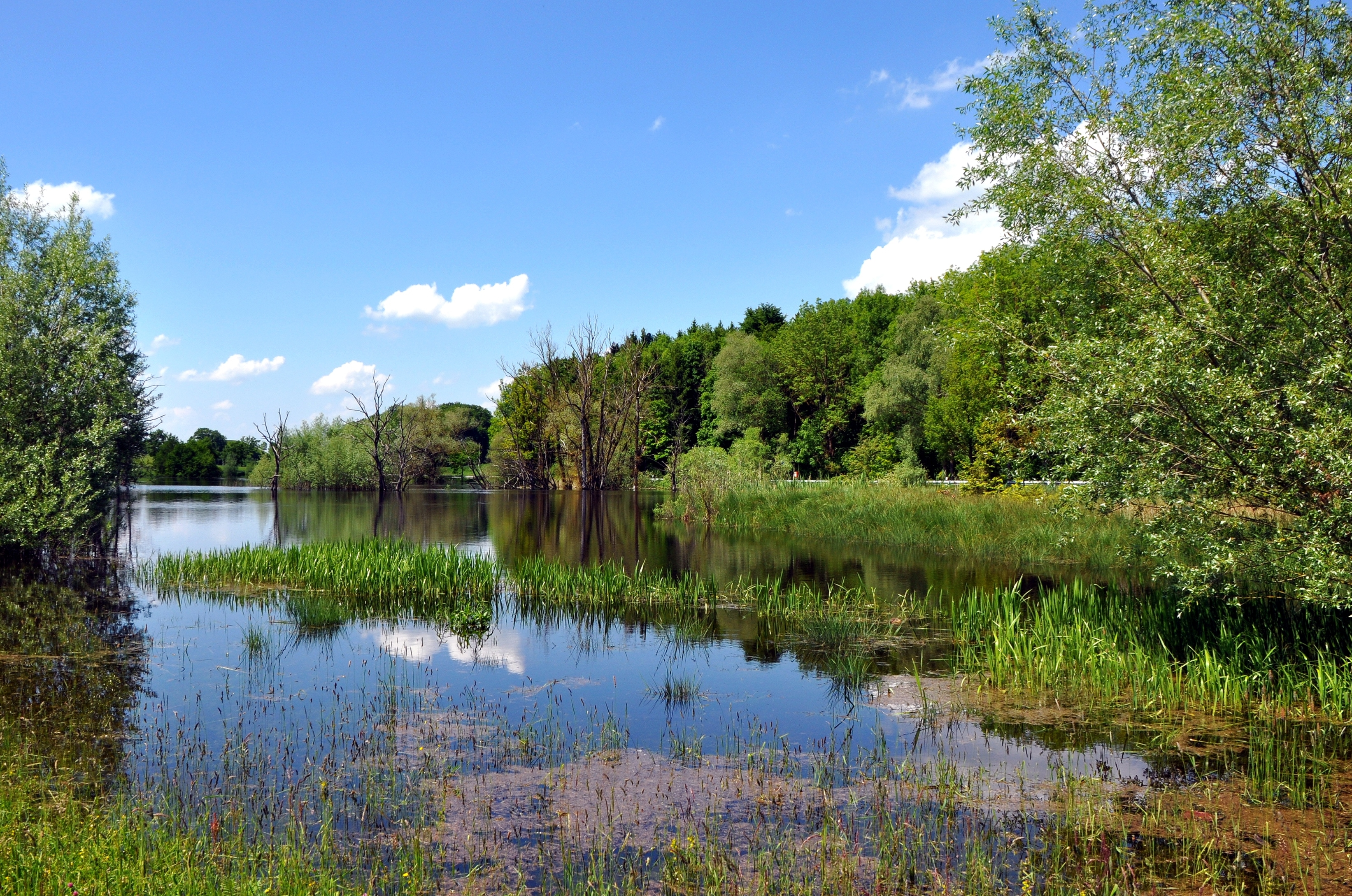 Andechs, OT Machtlfing. Moorsee in der Moränenlandschaft der Seacht'n im Landschaftsschutzgebiet Westlicher Teil des Landkreises Starnberg (LSG-00542.01).